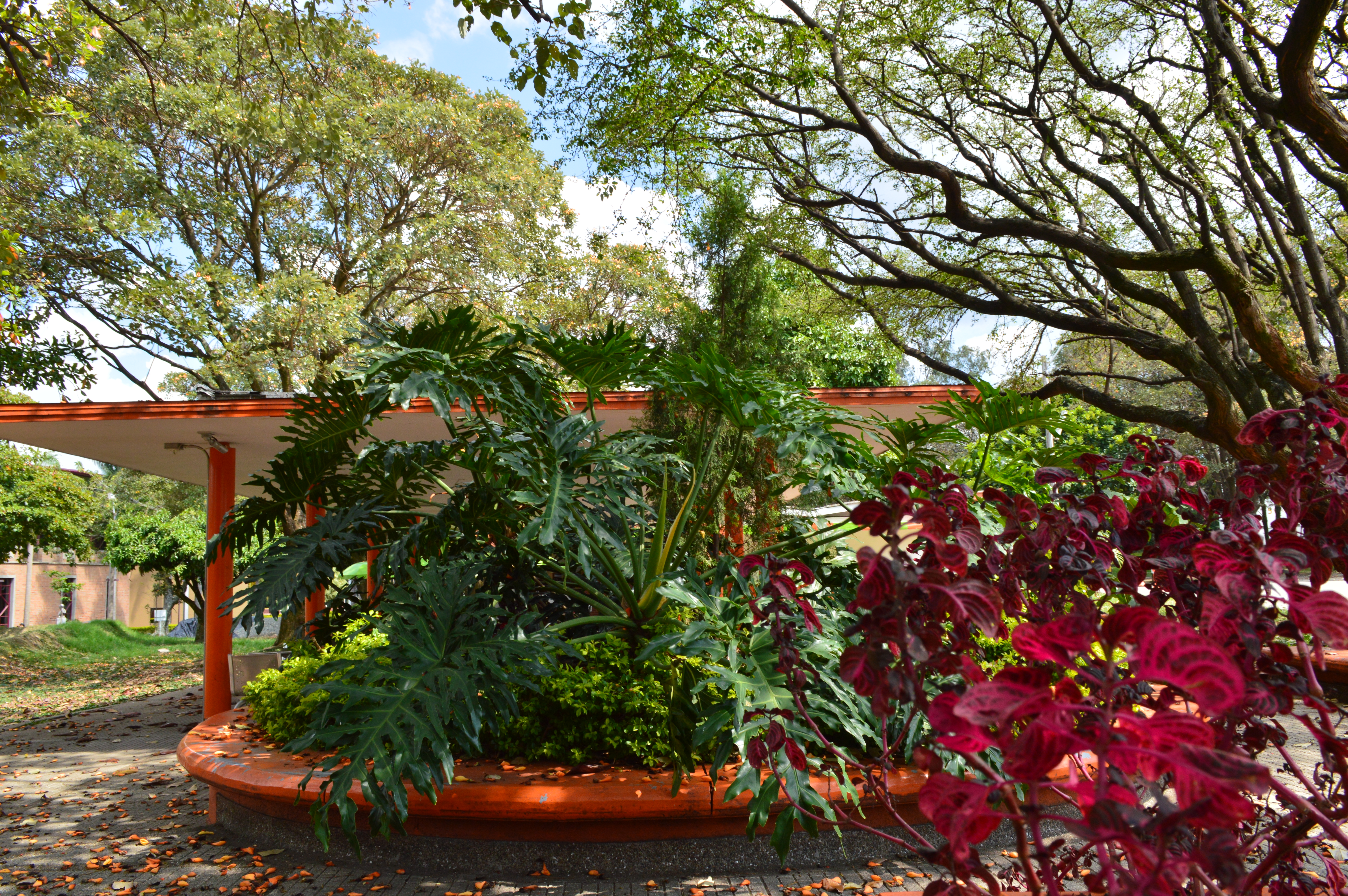 Cafetería